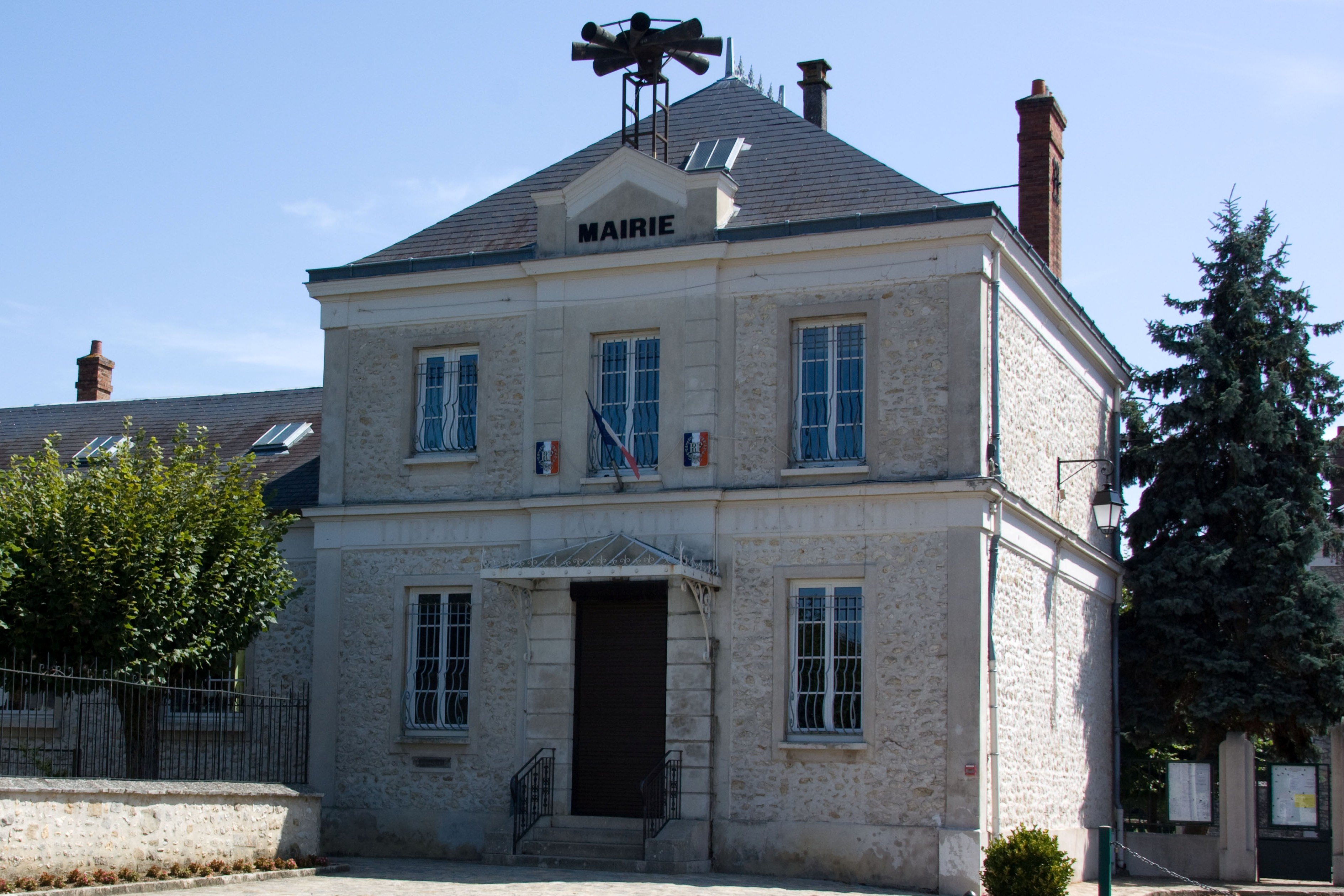 Mairie de Soisy-sur-Ecole, Soisy-sur-École, Essonne, France